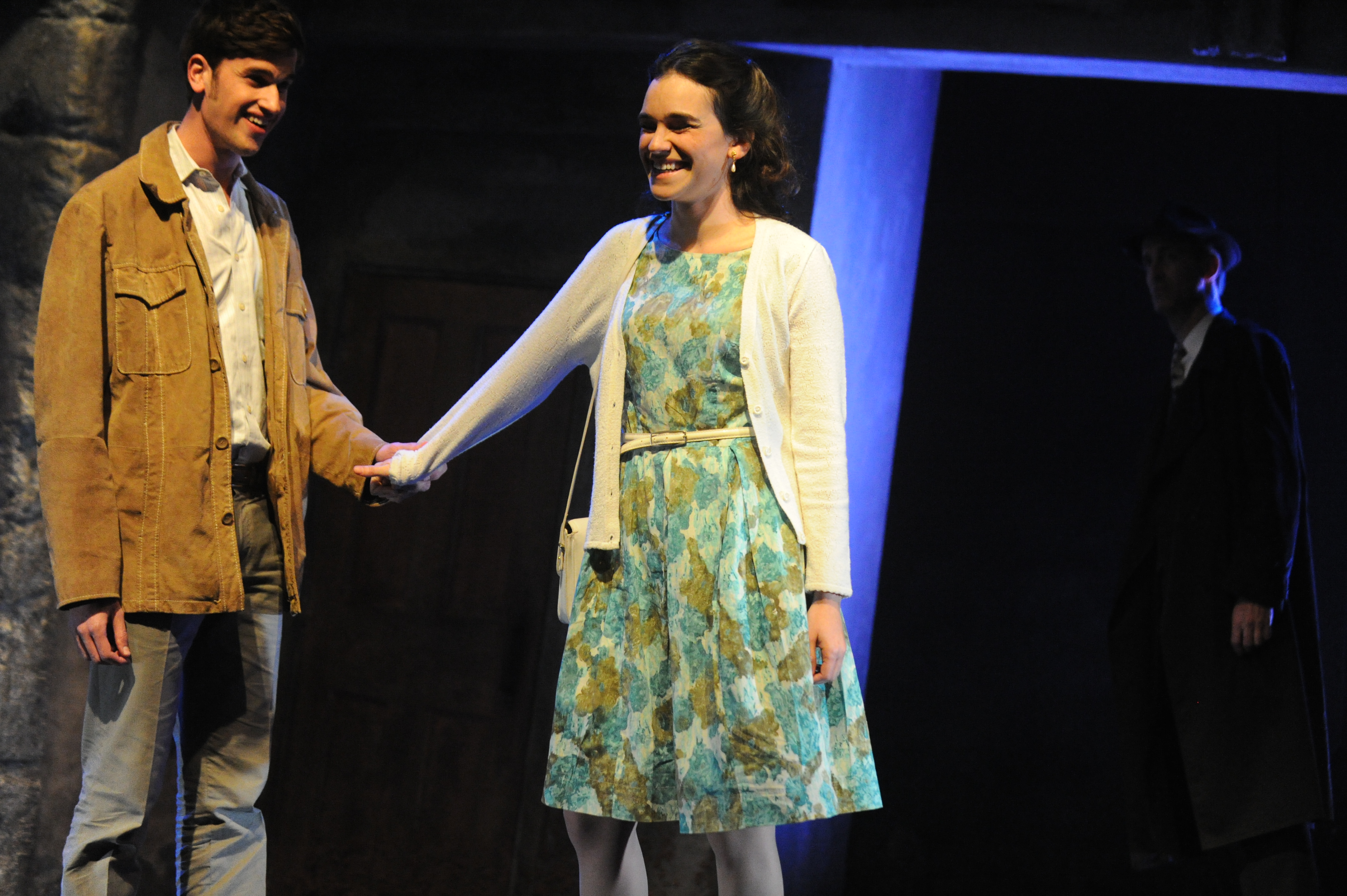 ניר רון, תמר אלקן ואריאל וולף, בהצגה "חוקר פרטי" בבימויו של מיקי גורביץ', תיאטרון החאן, 2012